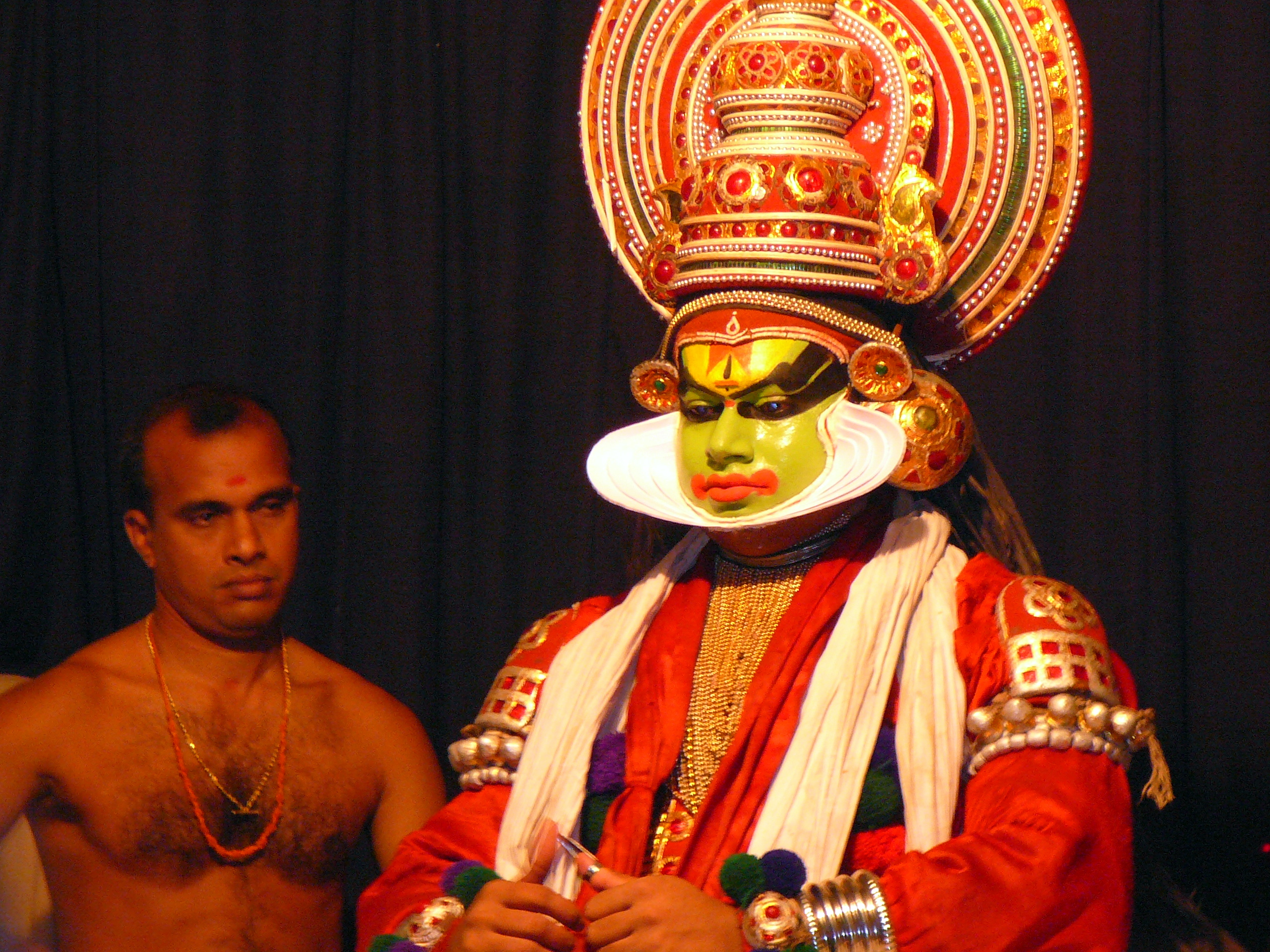 Kathakali performance at Thekkady.